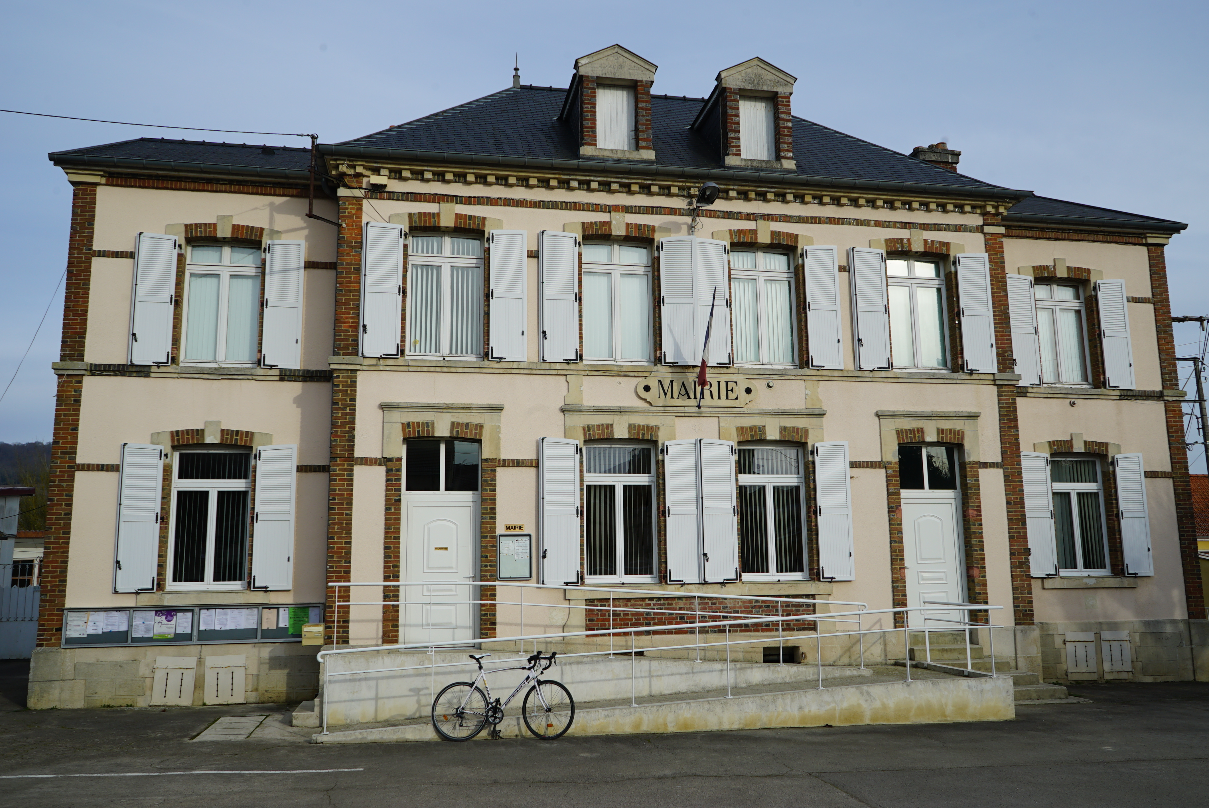 vue de la maison commune du village